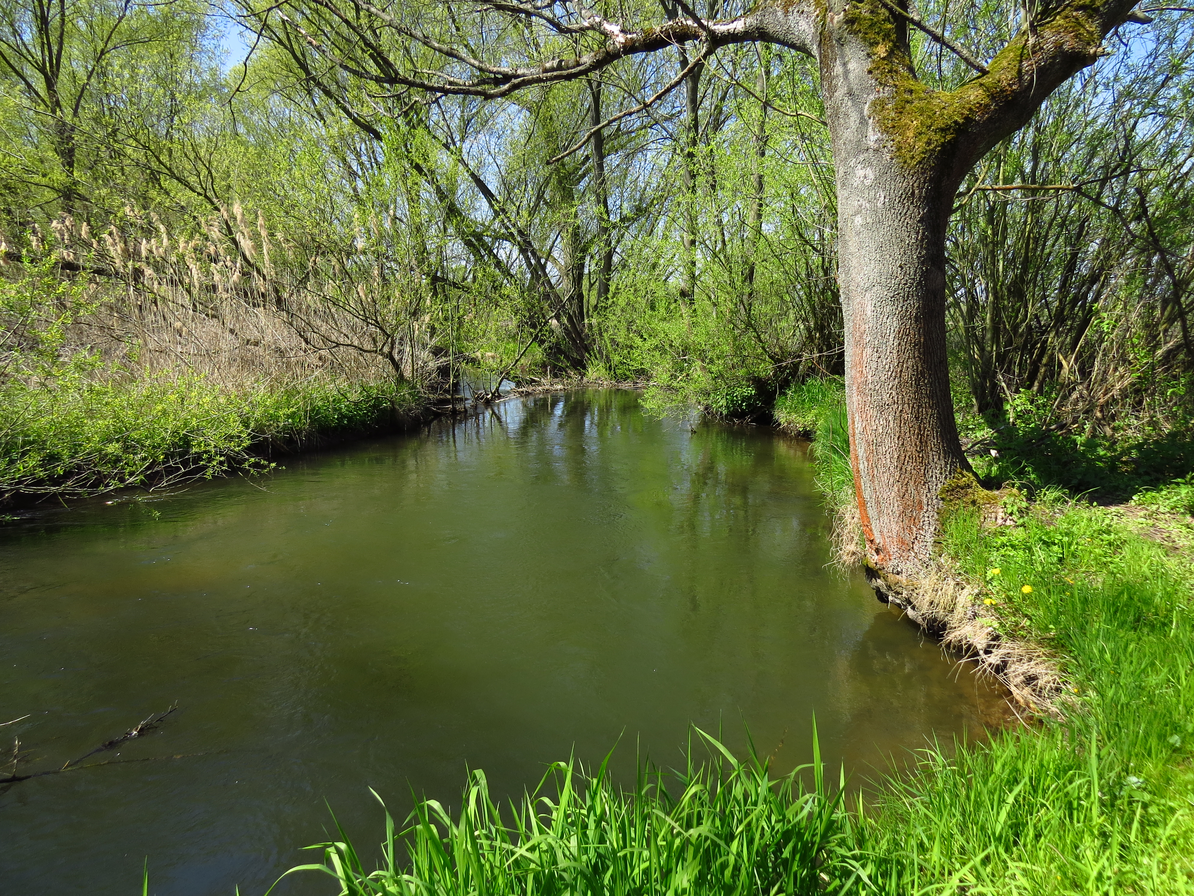 Stará Metuje